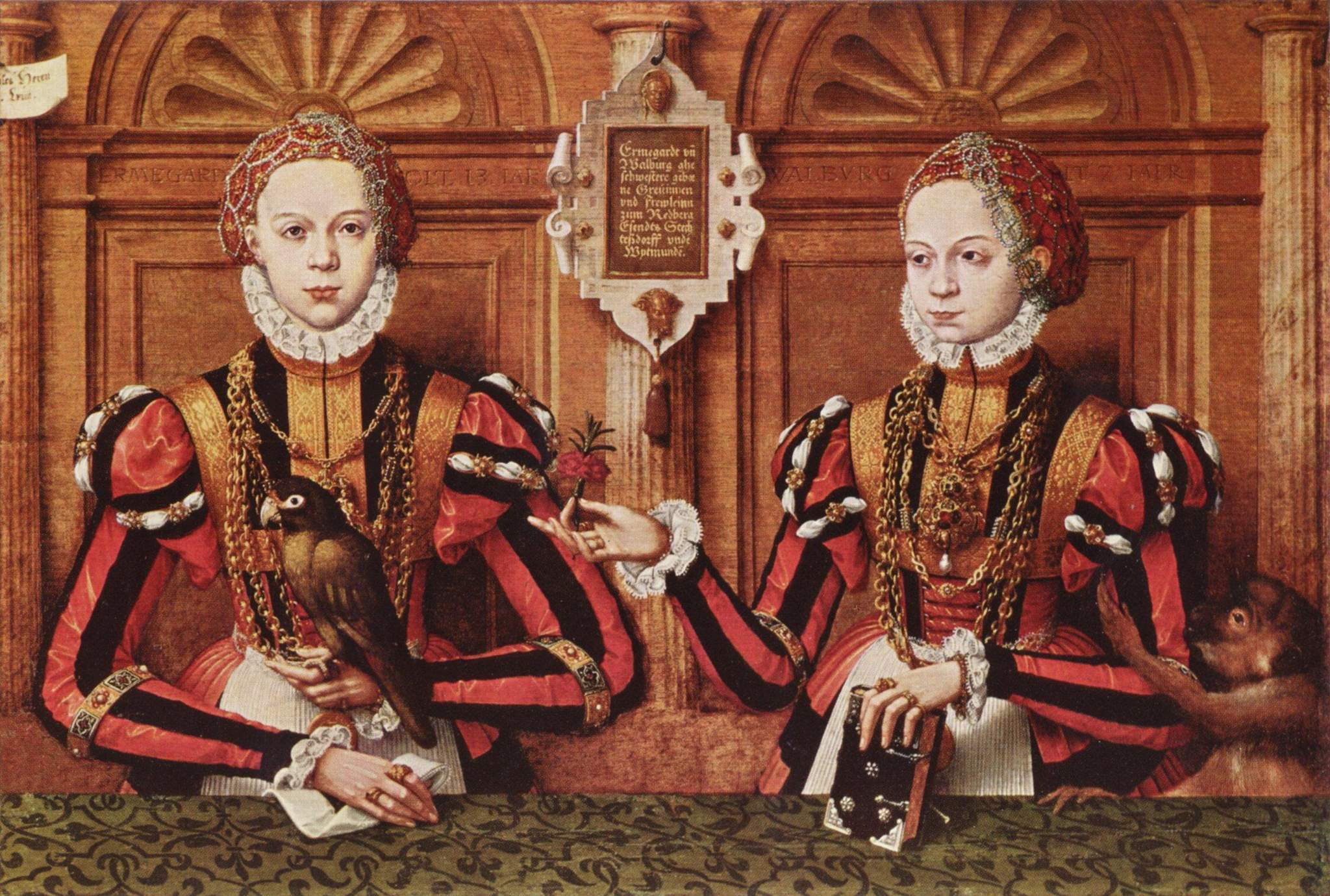 Detail: Ermengard und Walburg von Rietberg